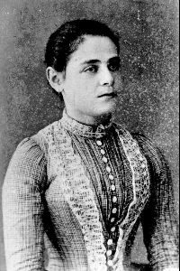 סוניה בלקינד